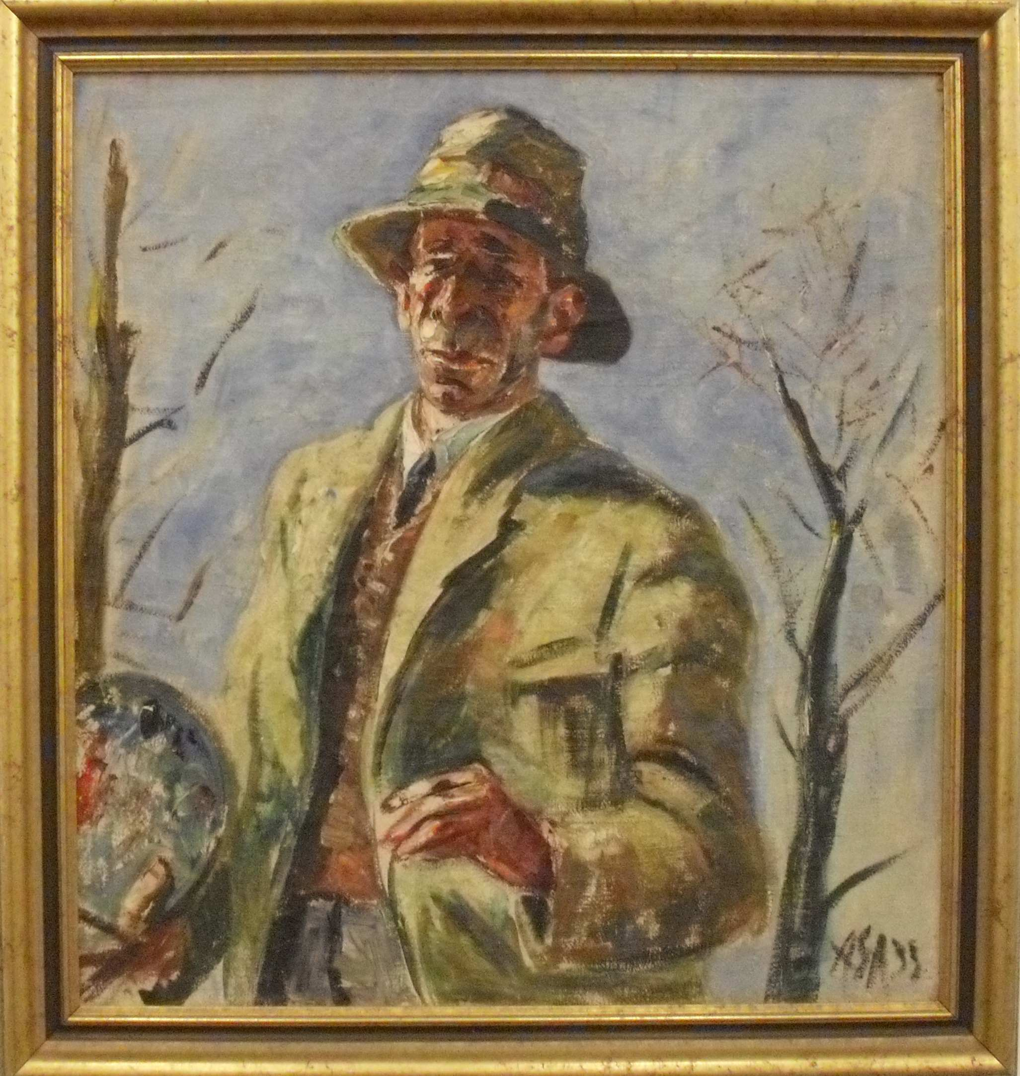 Selbstbildnis des Malers Albert Schiestl-Arding, Kunsthalle Schweinfurt